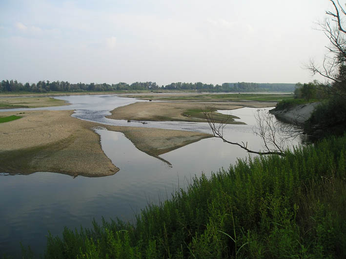 Fiume Po a Balossa Bigli, Pavia, Italy